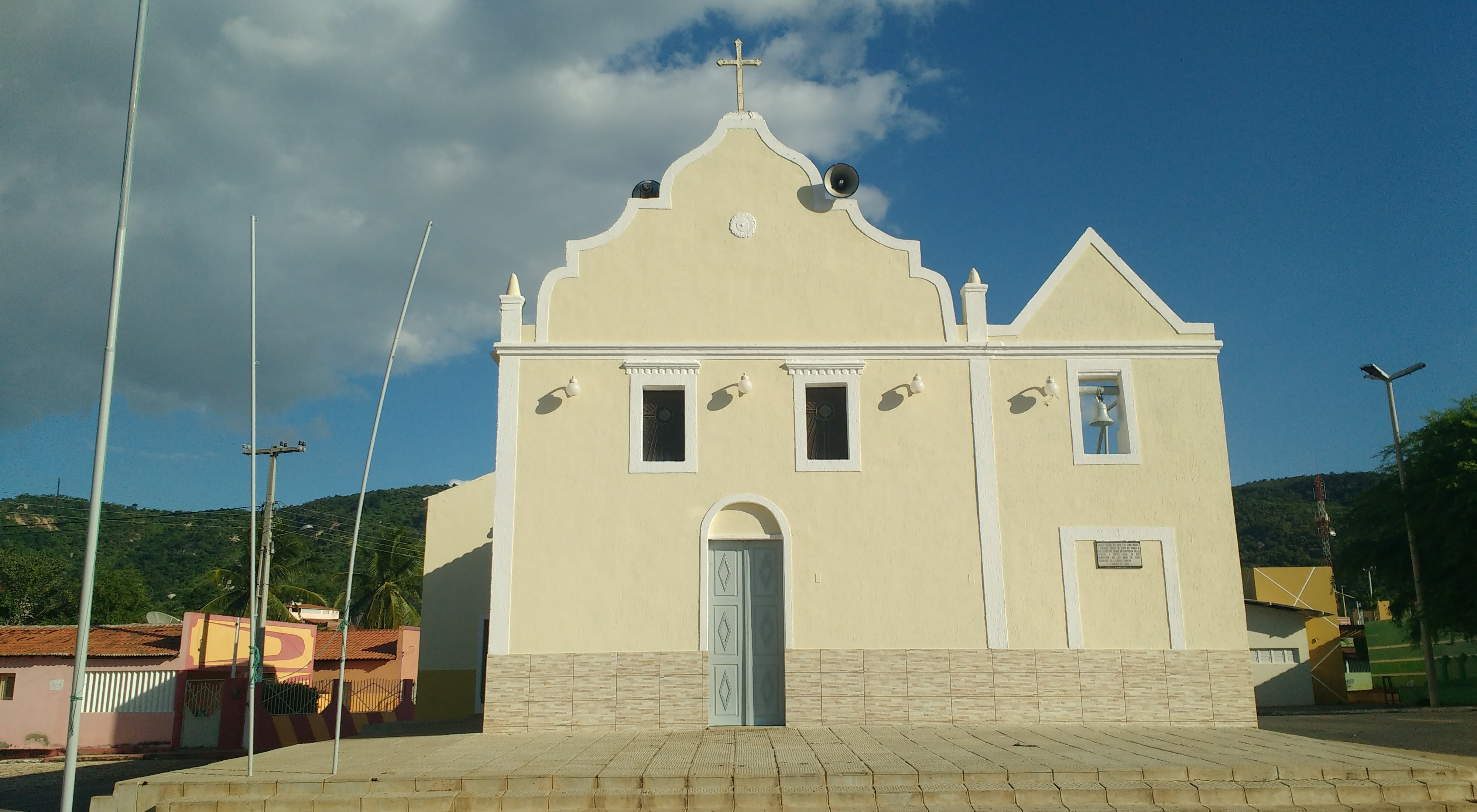 Capela de São Sebastião, padroeiro de João Dias, Rio Grande do Norte (Brasil)